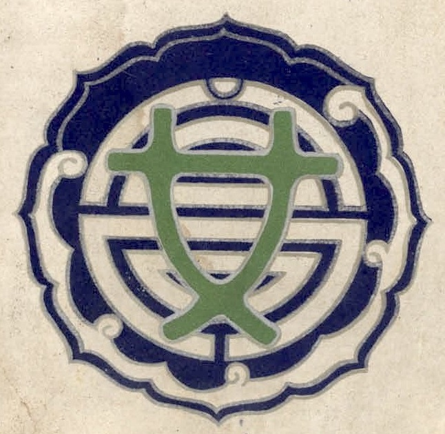 高雄州立高雄高等女學校校章